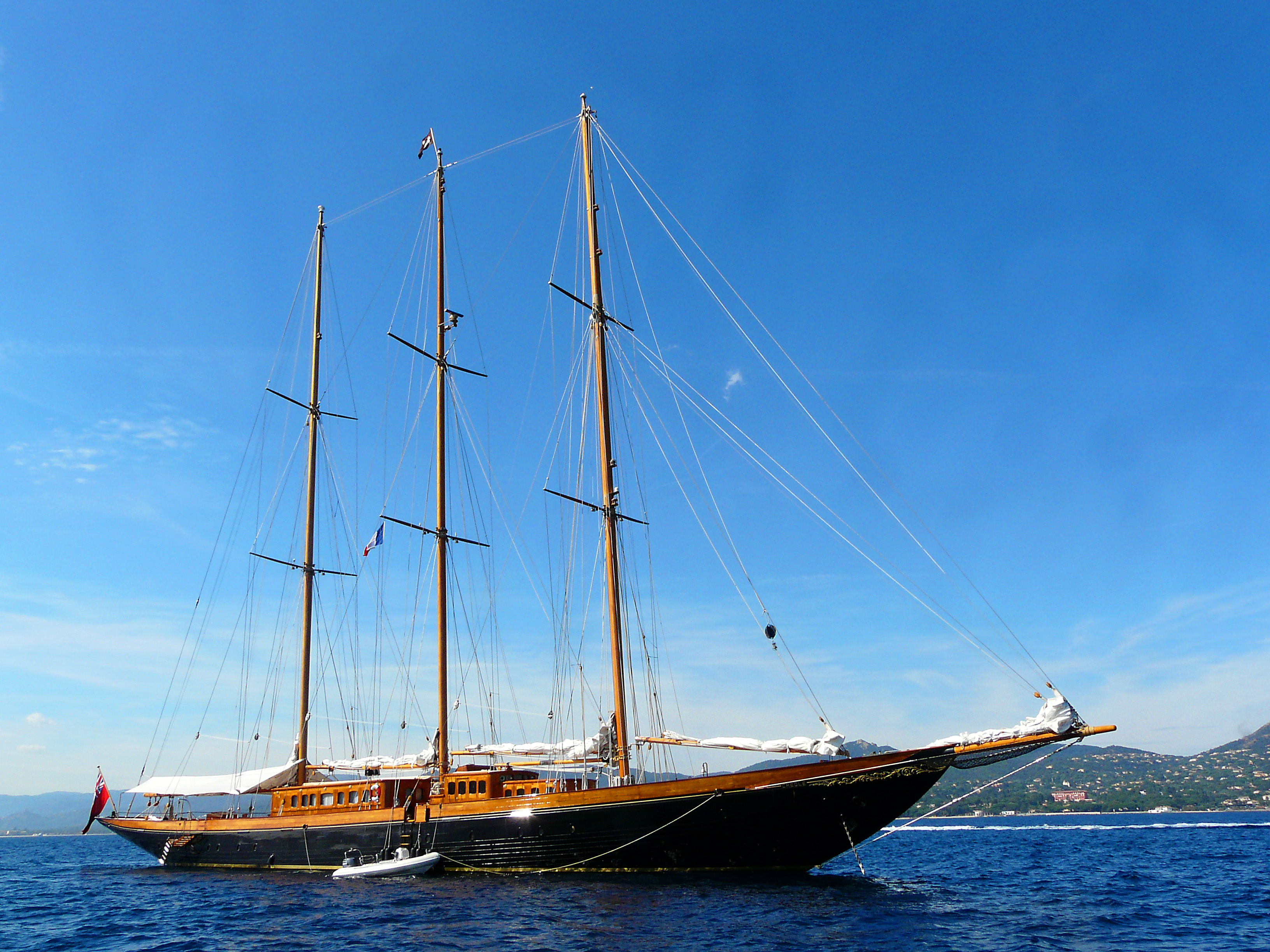 Trois-mâts à l'ancre dans le golfe de Saint-Tropez